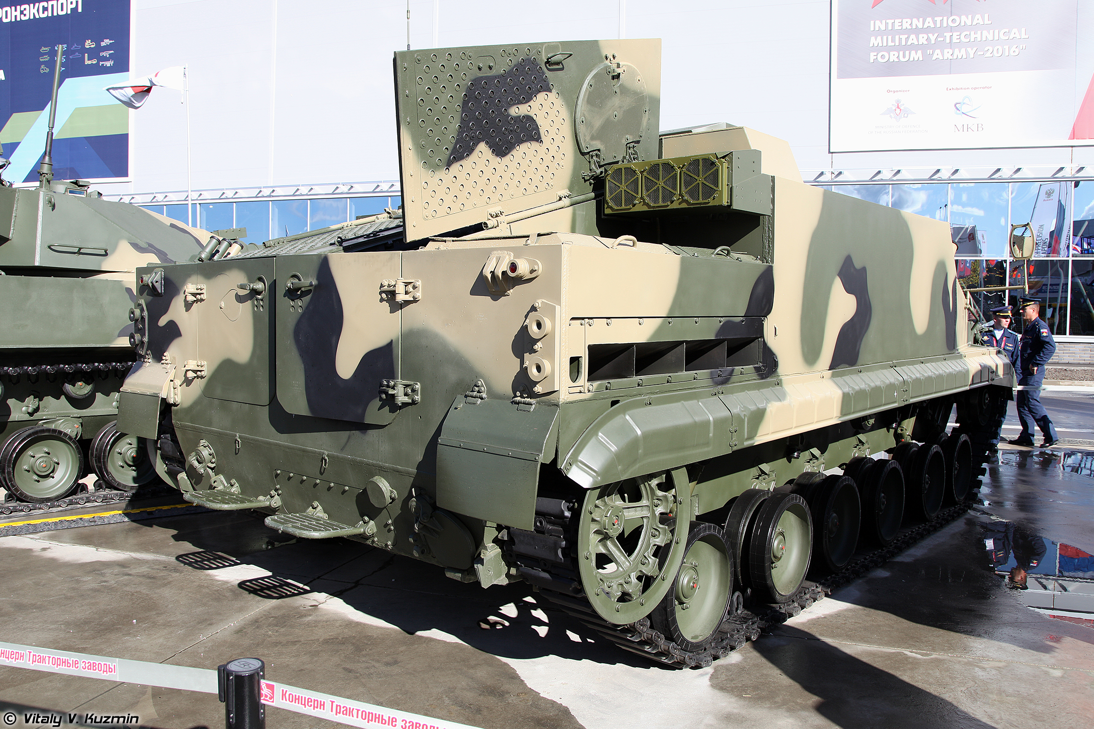 Бронетранспортер БТ-3Ф (BT-3F armored personnel carrier)